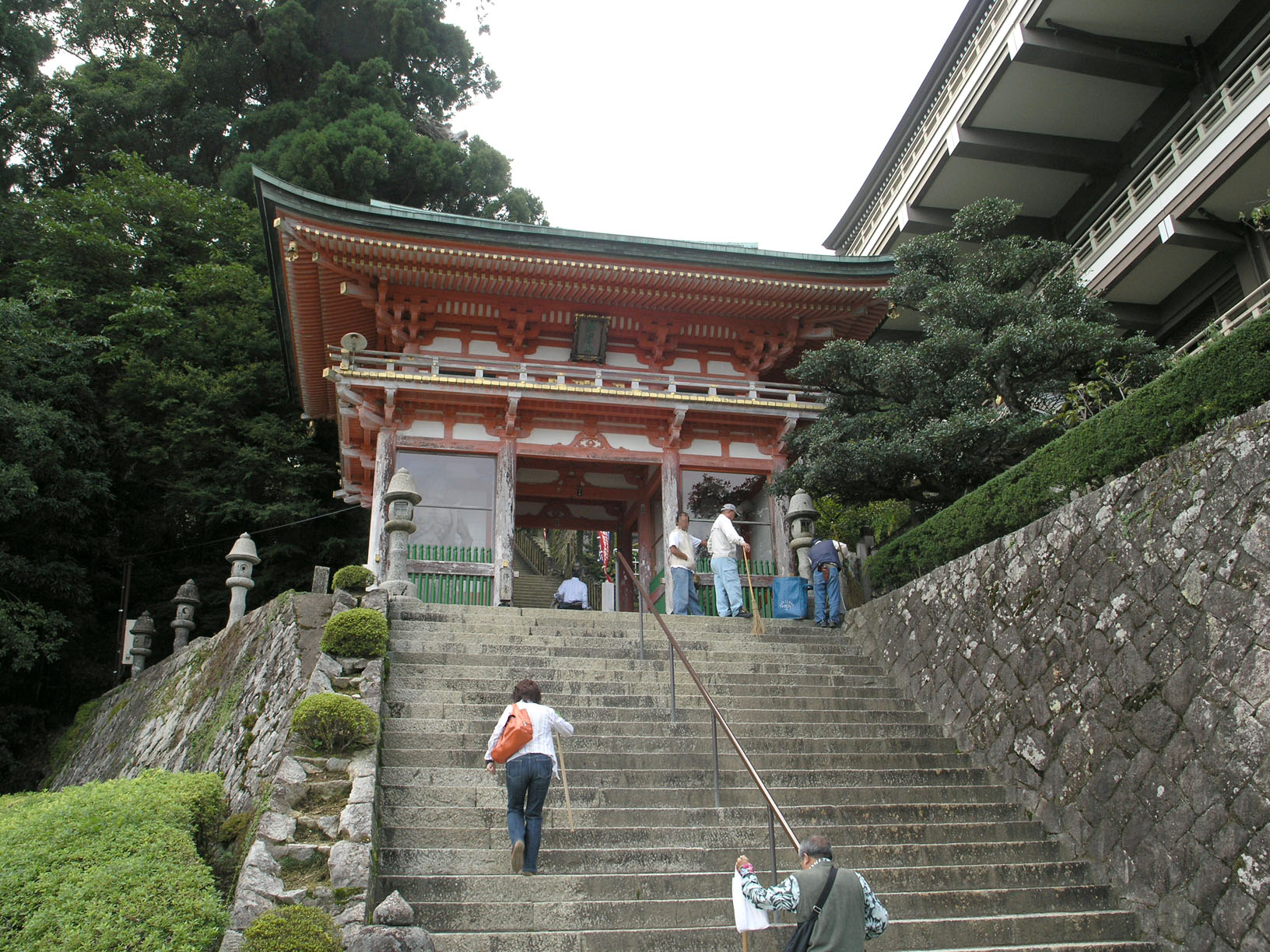 那智山青岸渡寺 (和歌山県東牟婁郡那智勝浦町) 2008年10月撮影。 機材：C8080WZ 撮影者：Kansai explorer